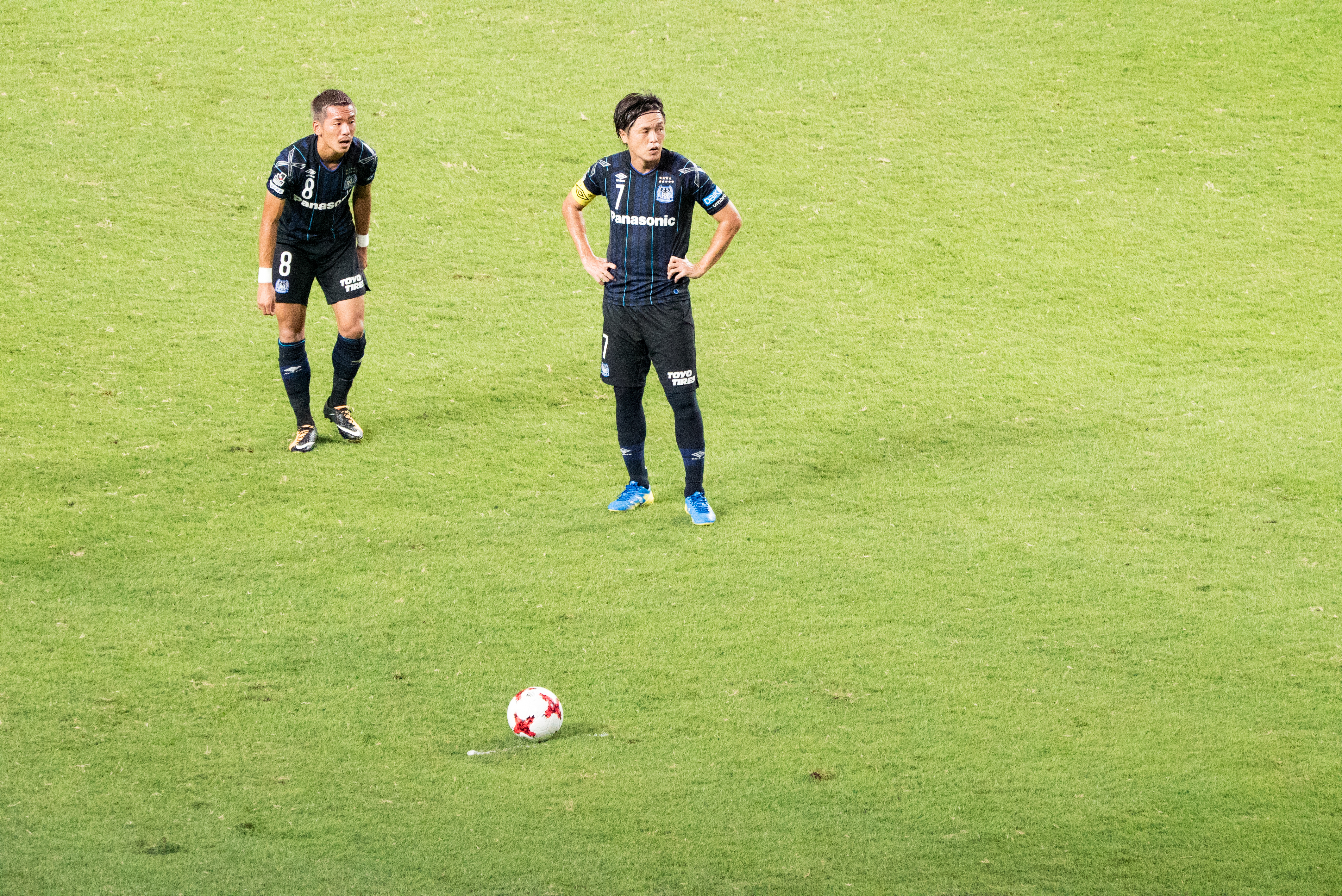 明治安田生命J1リーグ【2017シーズン17第25節】G大阪vs神戸-36.jpg